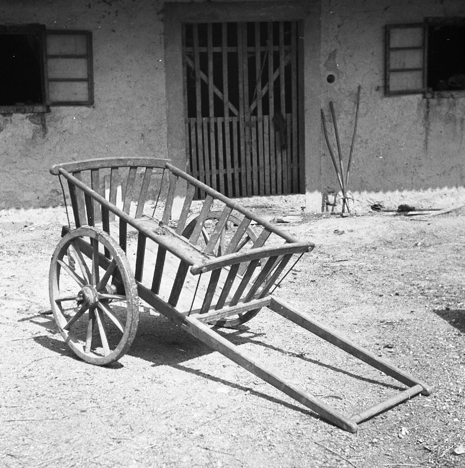 "Ciza" (ročni voziček), Malence.